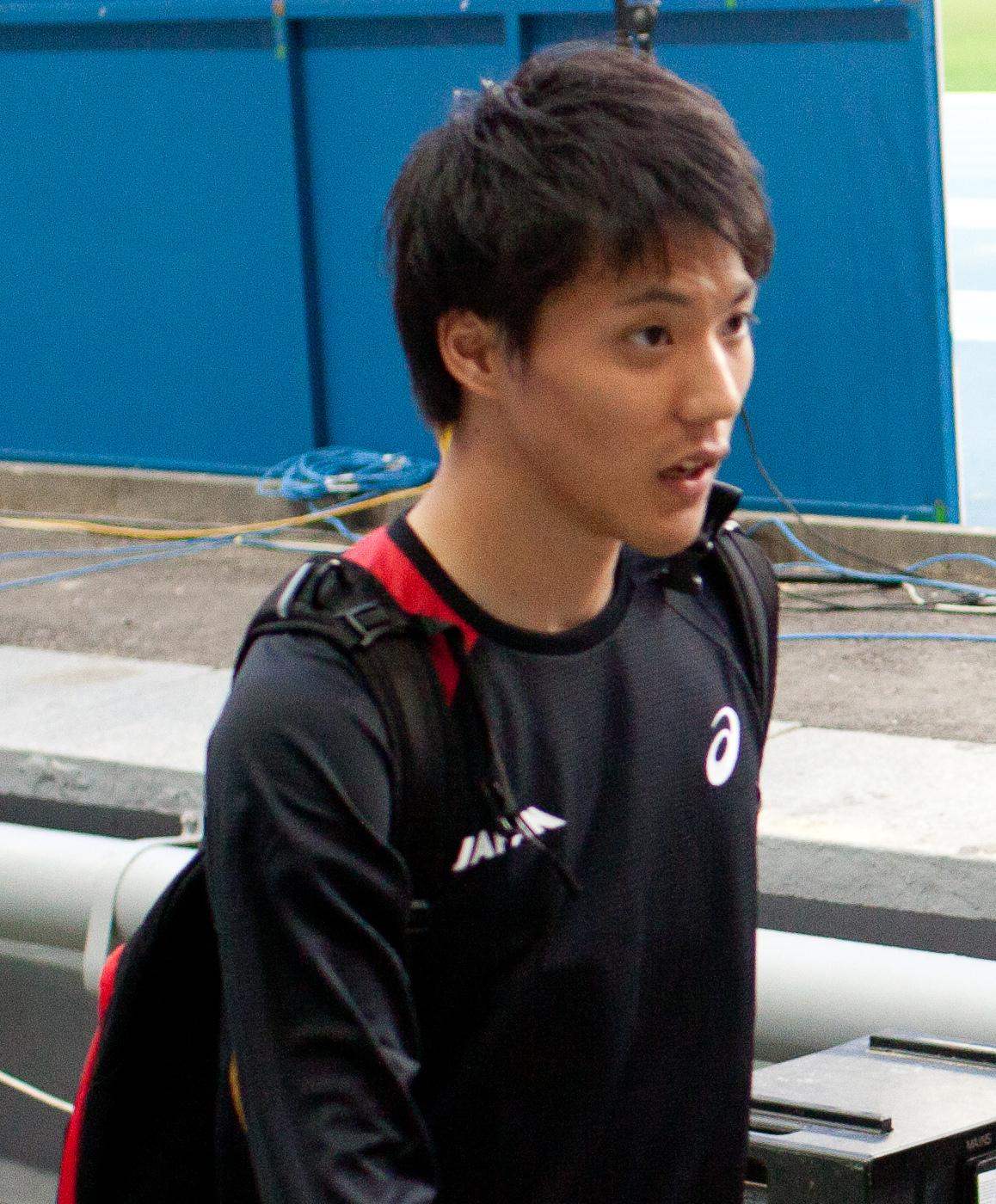 Первый день Чемпионата мира по легкой атлетике в Москве